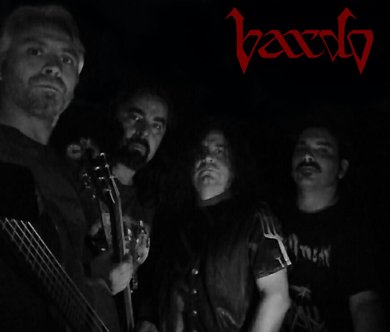 Bardo, integrantes actuales, logo.